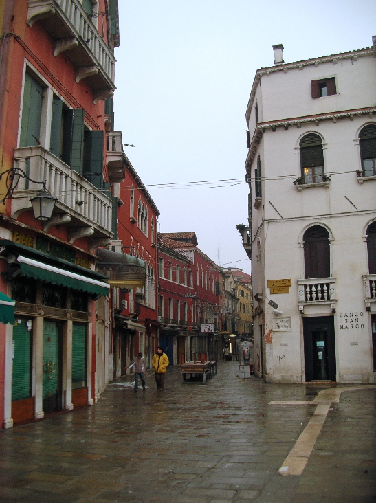 Lista di Spagna dagli Scalzi